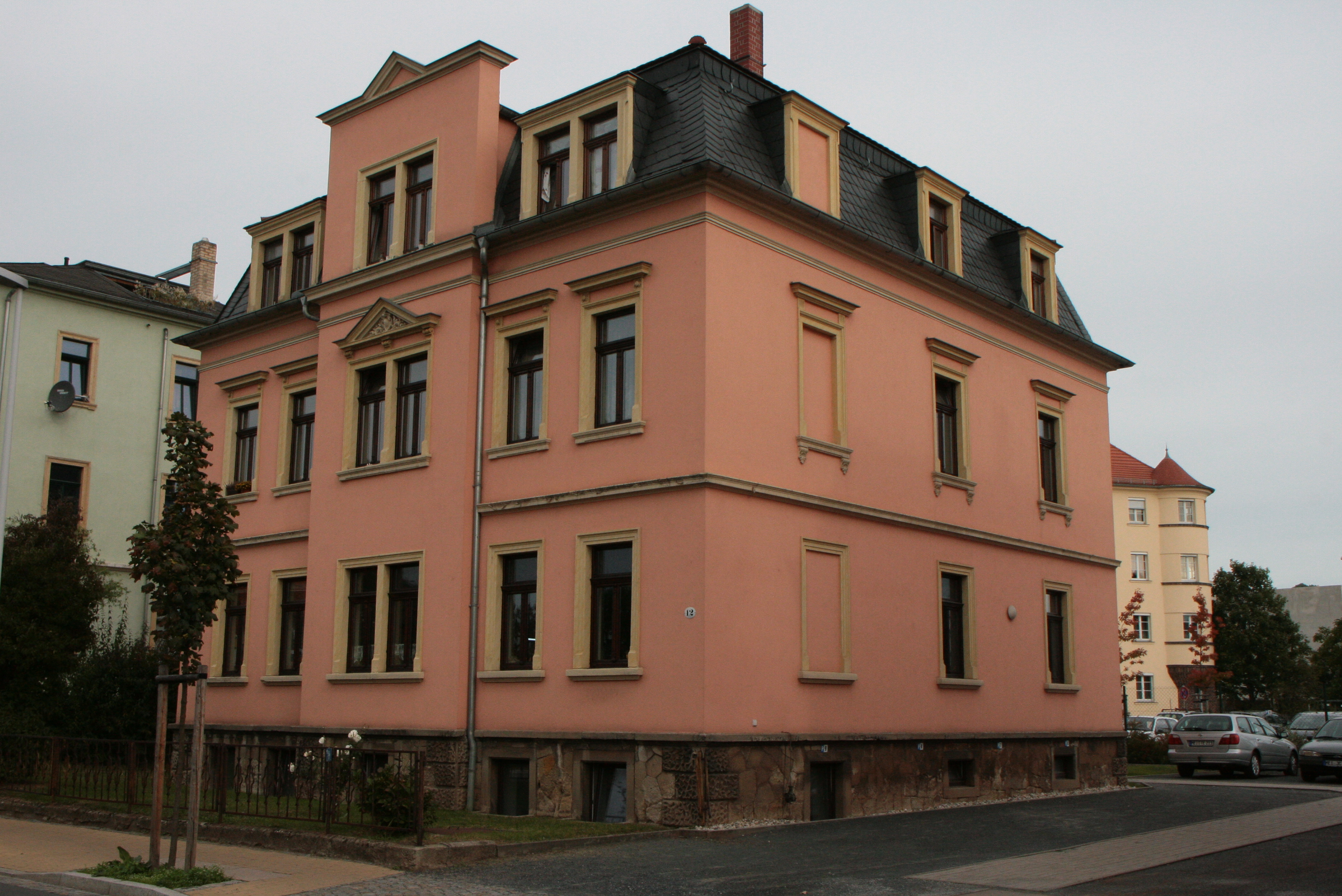 Mietshaus